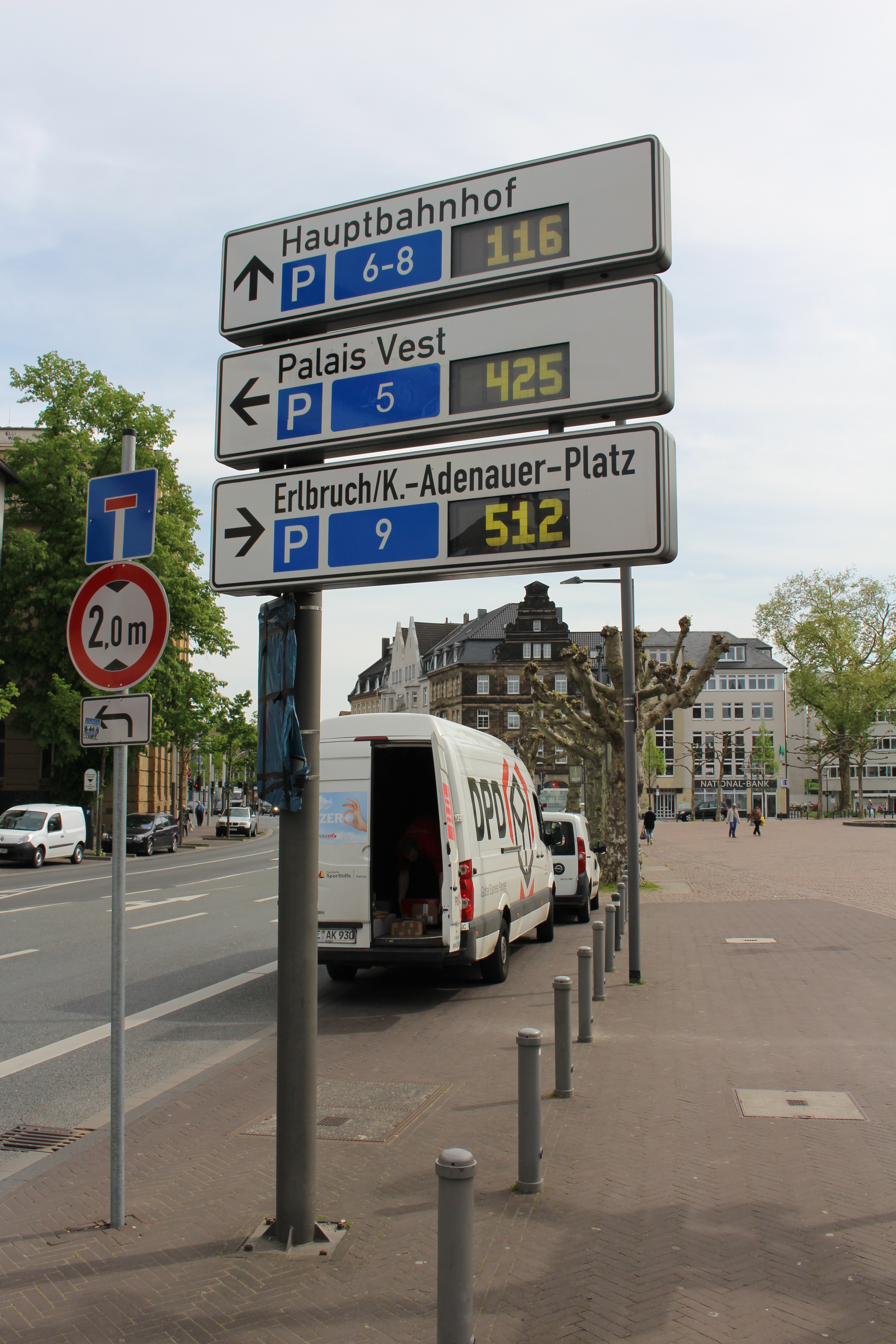 dynamisches Parkleitsystem am Wallring, Recklinghausen.